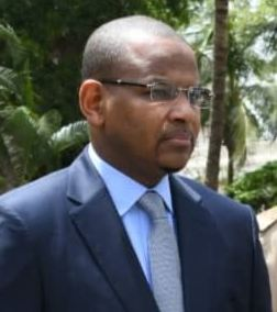 Le premier Ministre du Mali, Boubou Cissé et le président Ibrahim Boubakar Keita (en 2019). La même image sous d'autres angles : [1] et [2].